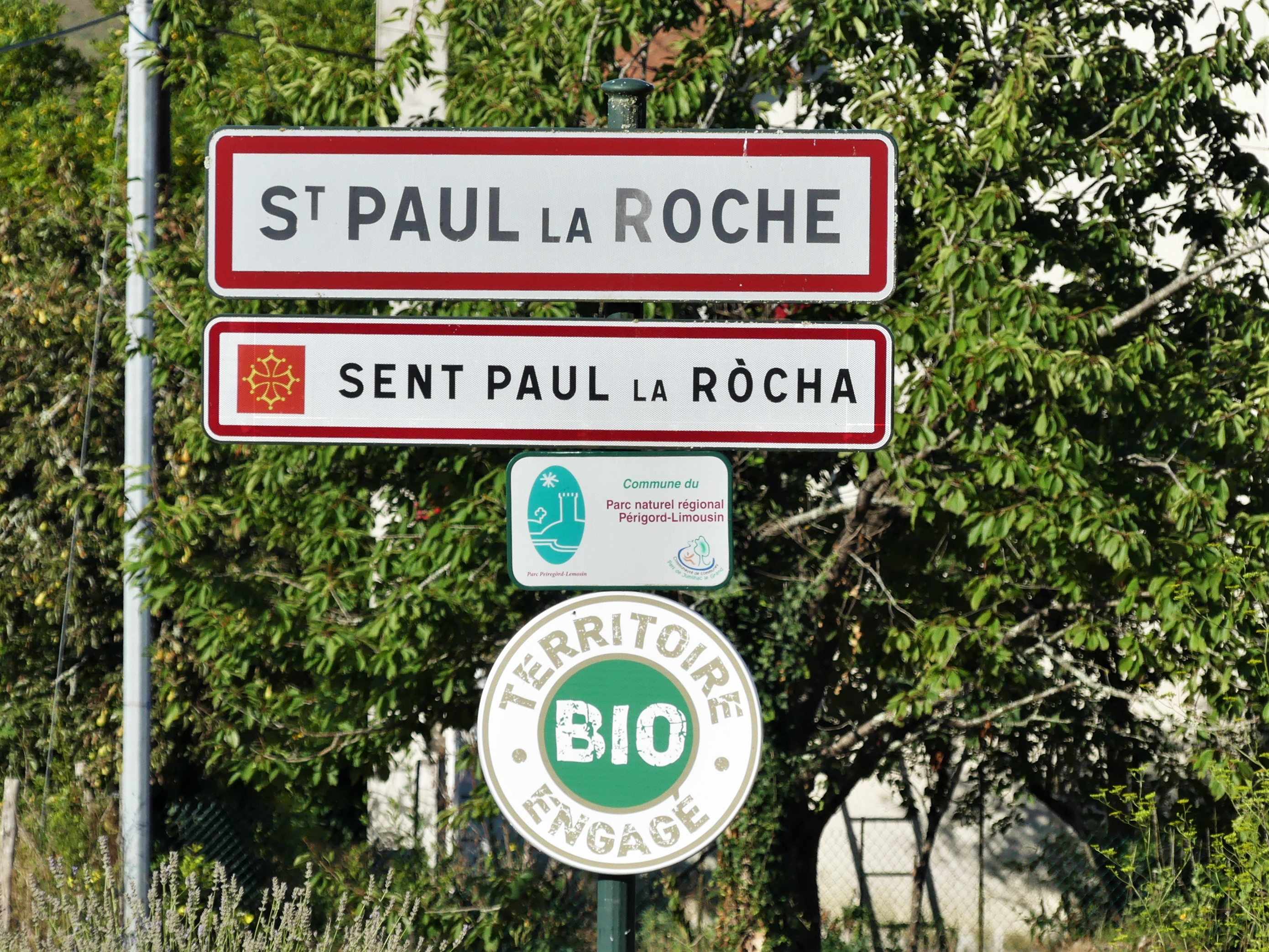 Panneau en français et occitan (avec une faute : devrait s'écrire Sent Pau la Ròcha), Saint-Paul-la-Roche, Dordogne, France.